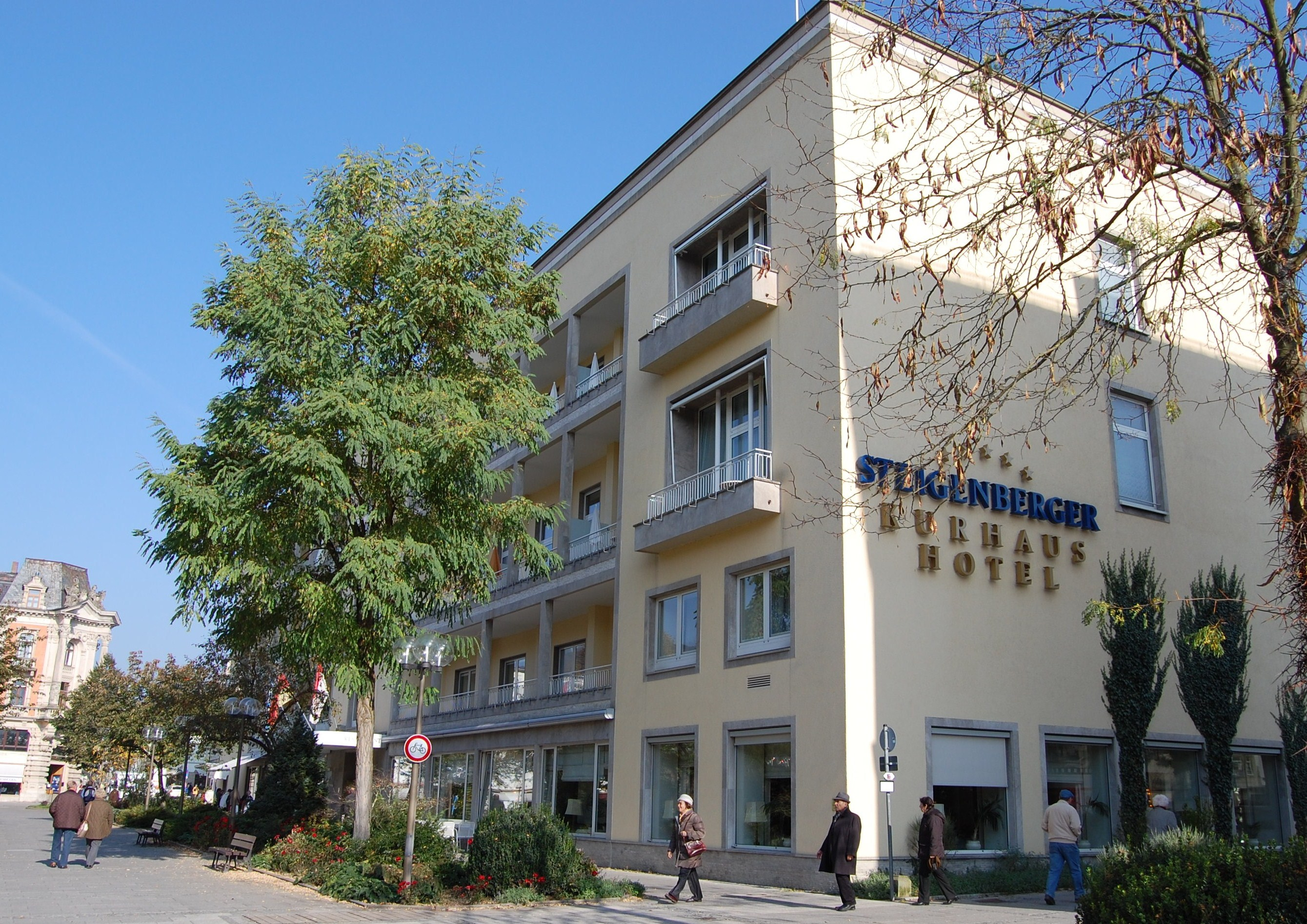 Steigenberger Hotel Bad Kissingen, früher Königliches Kurhaushotel